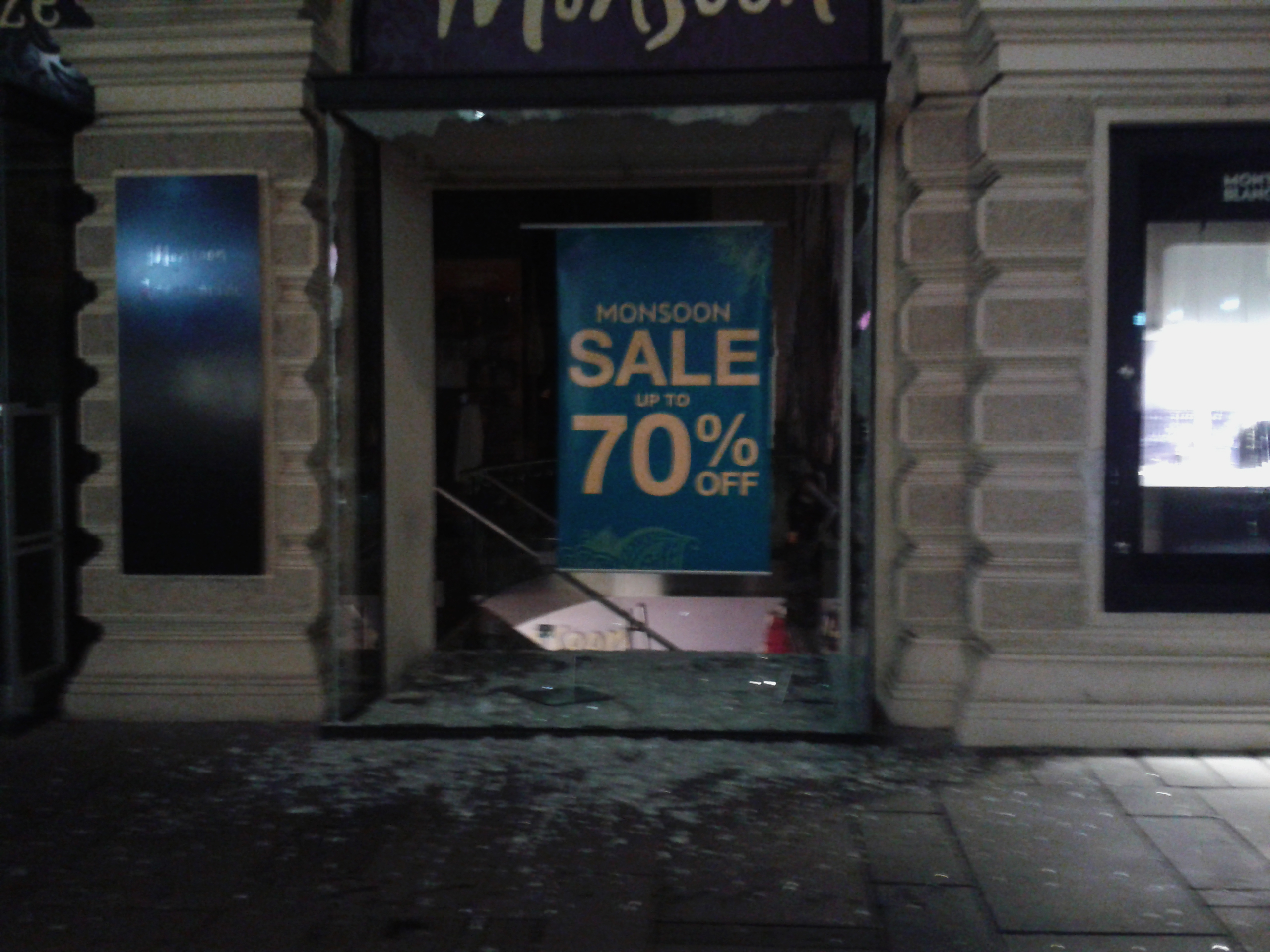 Zerschlagene Schaufensterscheibe am Graben in Wien im Rahmen des Akademikerballs 2014